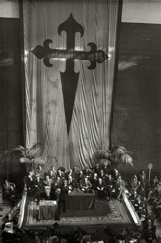 Título original: José Calvo Sotelo hablando en un mitin en el frontón Urumea (2/5) Localización: San Sebastián (Guipúzcoa)